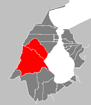 Cantón Perijá (1835 - 1904)